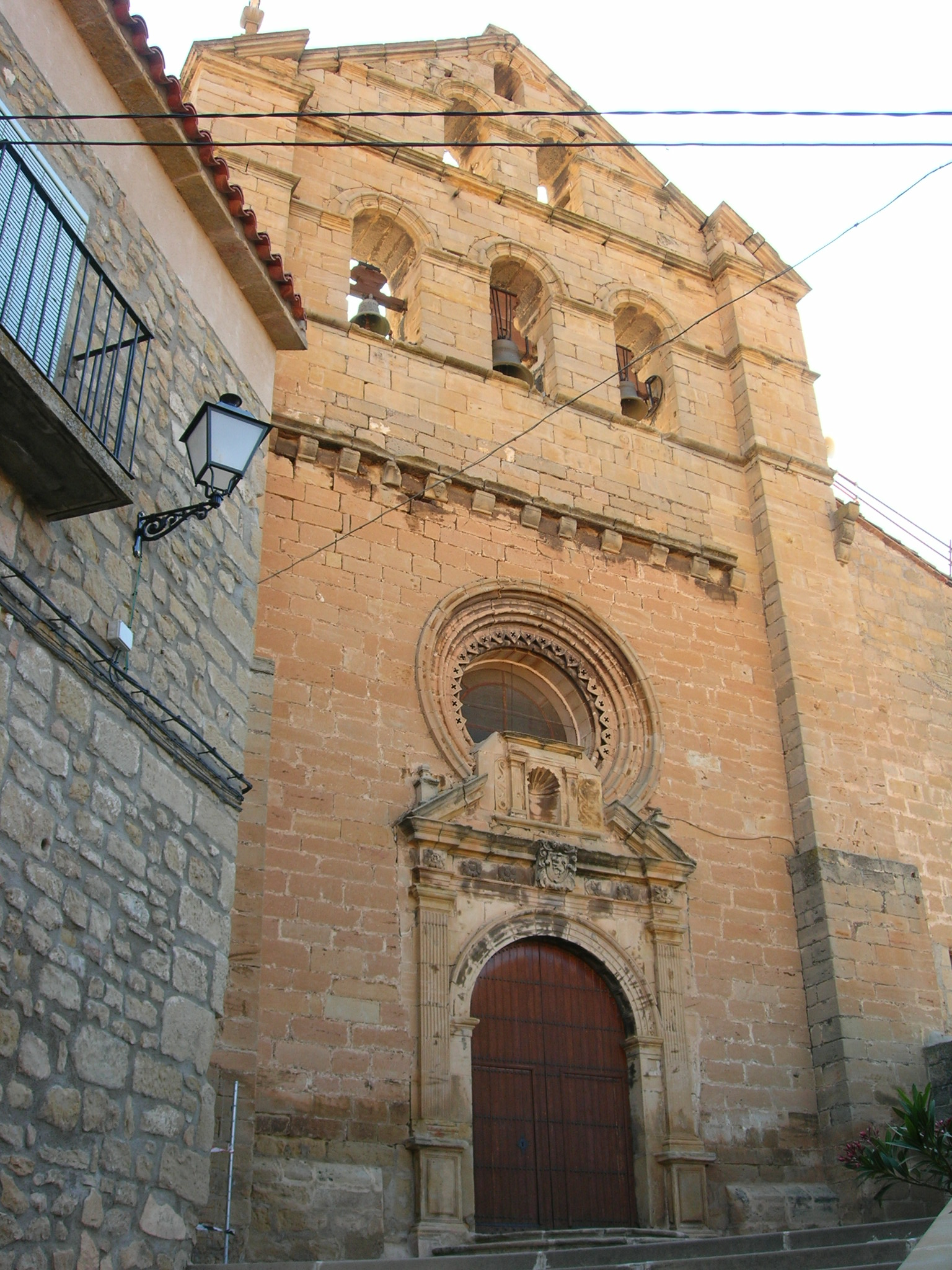 Església de Santa Maria la Major (Massalió)